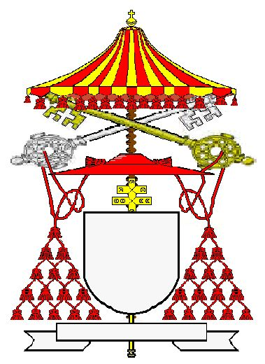 Eigen tekening van het tijdens een interregnum in het Vaticaan, de "sede vacante" gebruikte wapen van de Kardinaal-kamerheer. Als teken van zijn waardigheid plaatst de kardinaal de sleutels en een "ombrellino" of baldakijn boven zijn wapenschild. De twee sleutels zijn met het koord van de kwasten aaneengebonden. Tekening: Robert Prummel